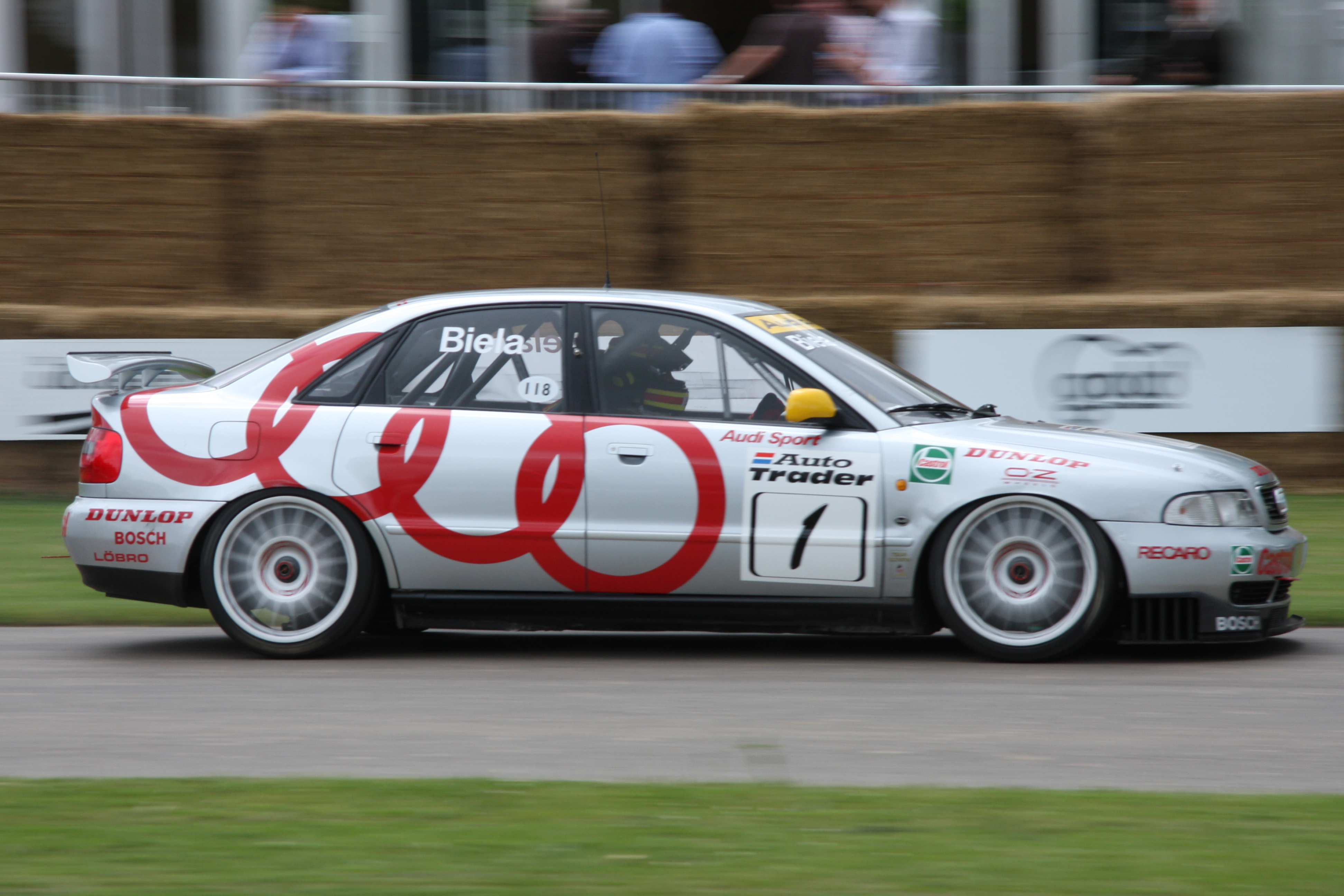 Built 1996. 2 litre 4 cylinder